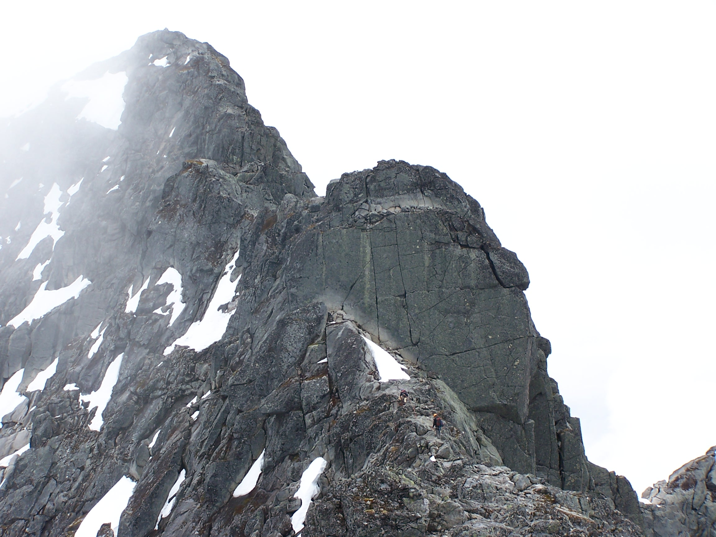 Klatrere mot Halls hammer på Skagastølsryggen